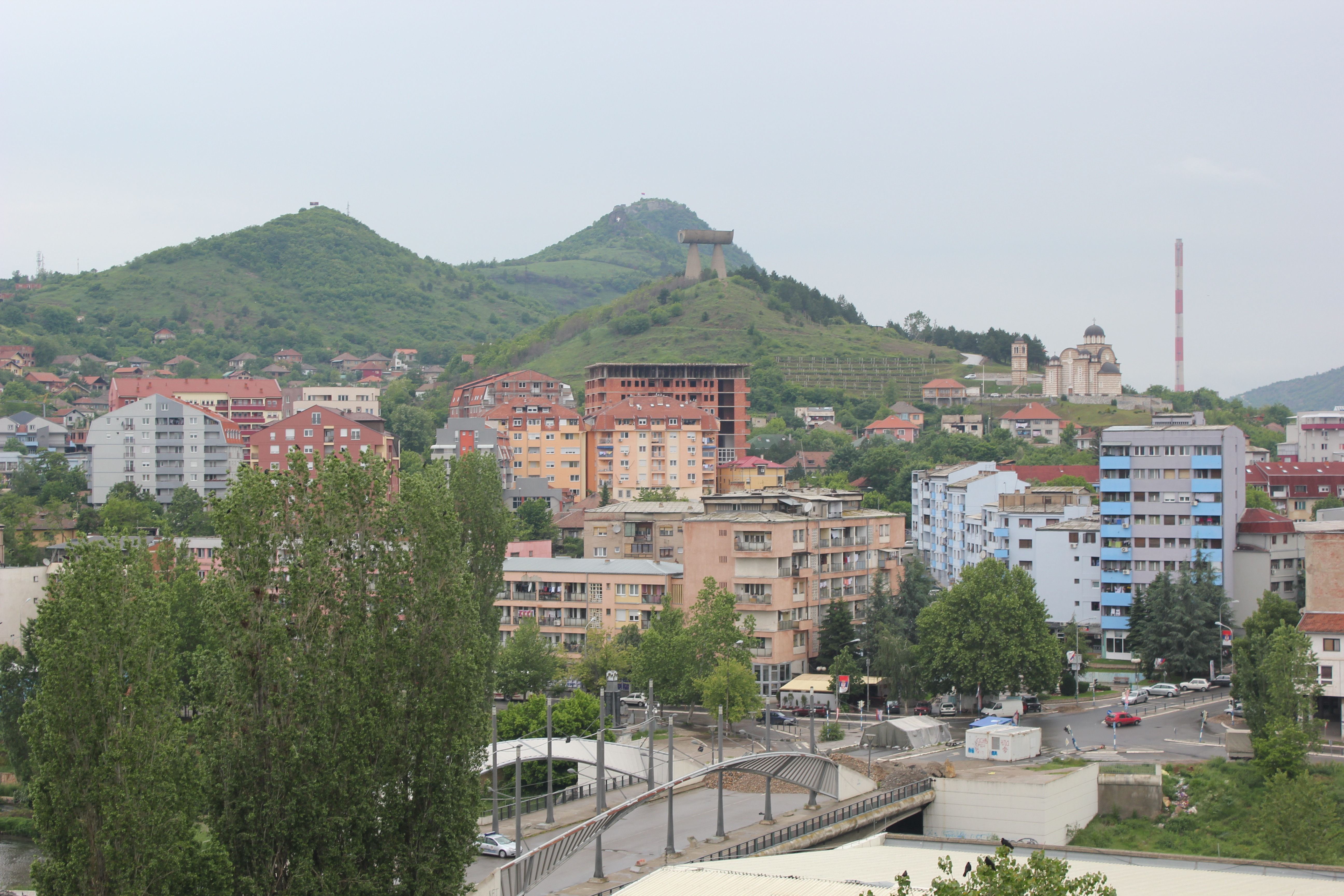 Pamje e pjesës veriore të Mitrovicës e parë nga lart